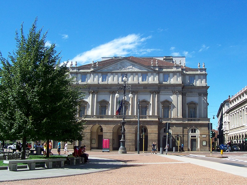 Milano - Teatro alla Scala